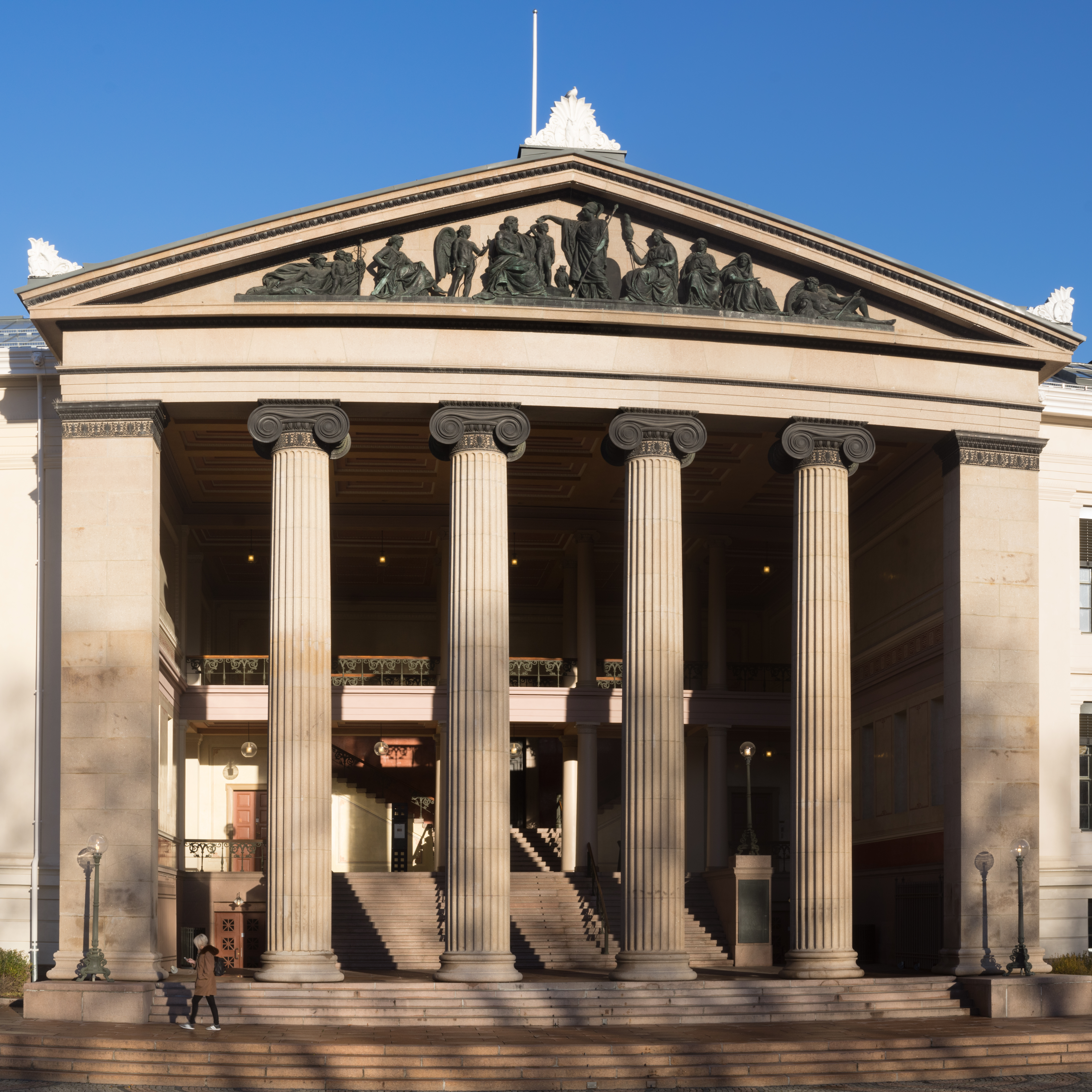 Det juridiske fakultet i Oslo 2015